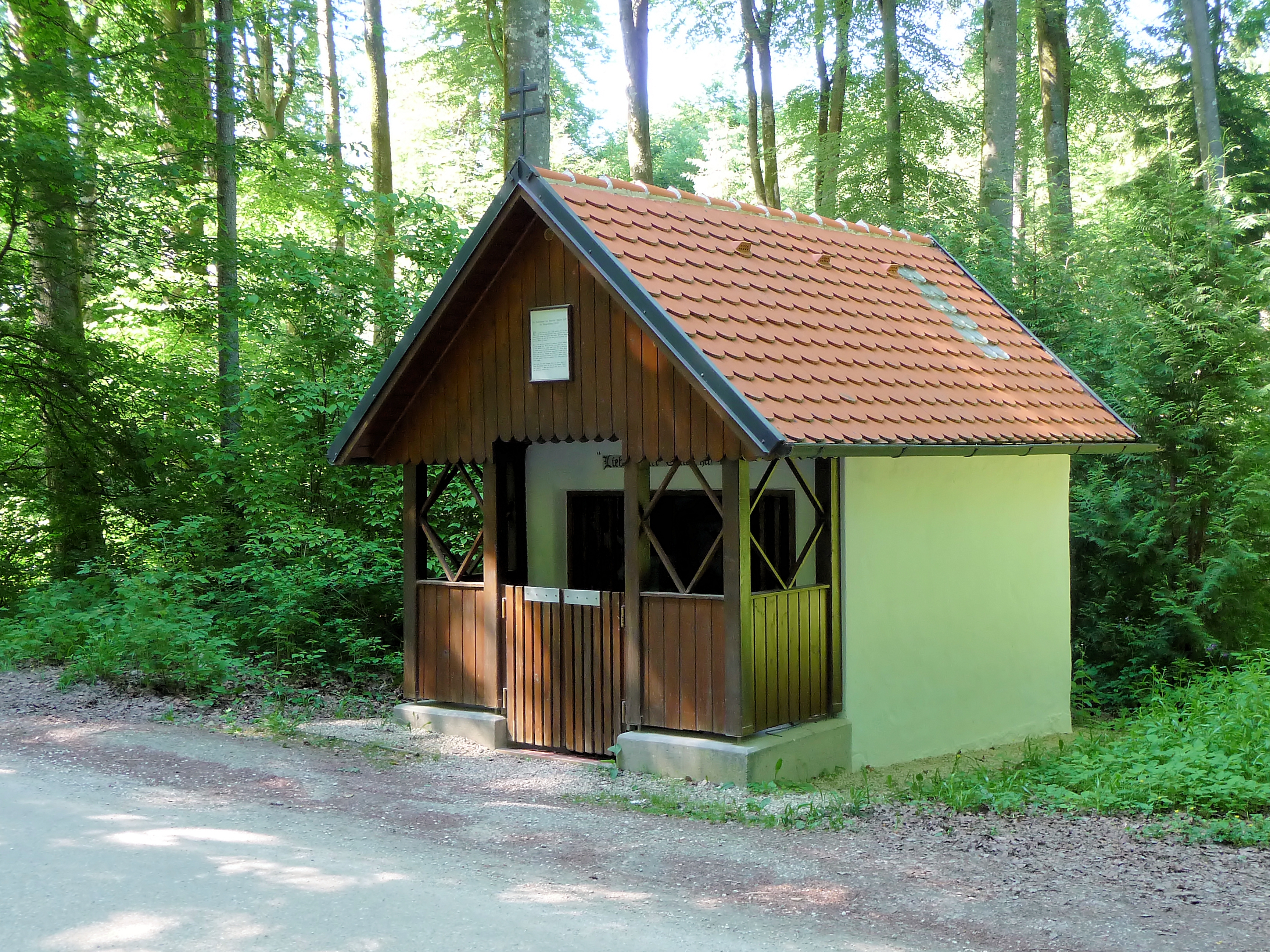 Dürnbucher Forst, Mariahilfkapelle. Zu ihrer Enstehung gibt die weiße Schrifttafel am Giebel der Kapelle folgende Auskunft: "Es mochte etwa im Jahre 1745 gewesen sein. Da zog, wie uns von glaubwürdiger Seite mitgeteilt wird, ein Handelsmann durch den damals sehr dichten Wald des Siegenburger Forstes. Er war auf dem Wege nach Ingolstadt, um sich dort Waren zu holen. Wie er nun mit seinem Pferde so dahinzog, stürzten pötzlich aus dem Walde drei Mann, um ihn auszurauben. Der eine fiel dem Pferde in die Zügel, um so den Weg zu versperren. In seinem Schrecken rief der Überfallene aus: Liebe Mutter Gottes, hilf mir! In demselben Augenblicke bäumte sich das Pferd hoch auf und verletzte den Räuber so schwer, dass er nichts mehr unternehmen konnte. Die anderen flohen entsetzt in den Wald zurück, so dass der Reisende seinen Weg wieder fortsetzen konnte. Zum Danke für seine Rettung lies er an dieser Stelle die kleine Waldkapelle bauen. Er gab ihr den Namen Mariahilfkapelle. Wie uns berichtet wird, soll der Mann aus Elsendorf gewesen sein."